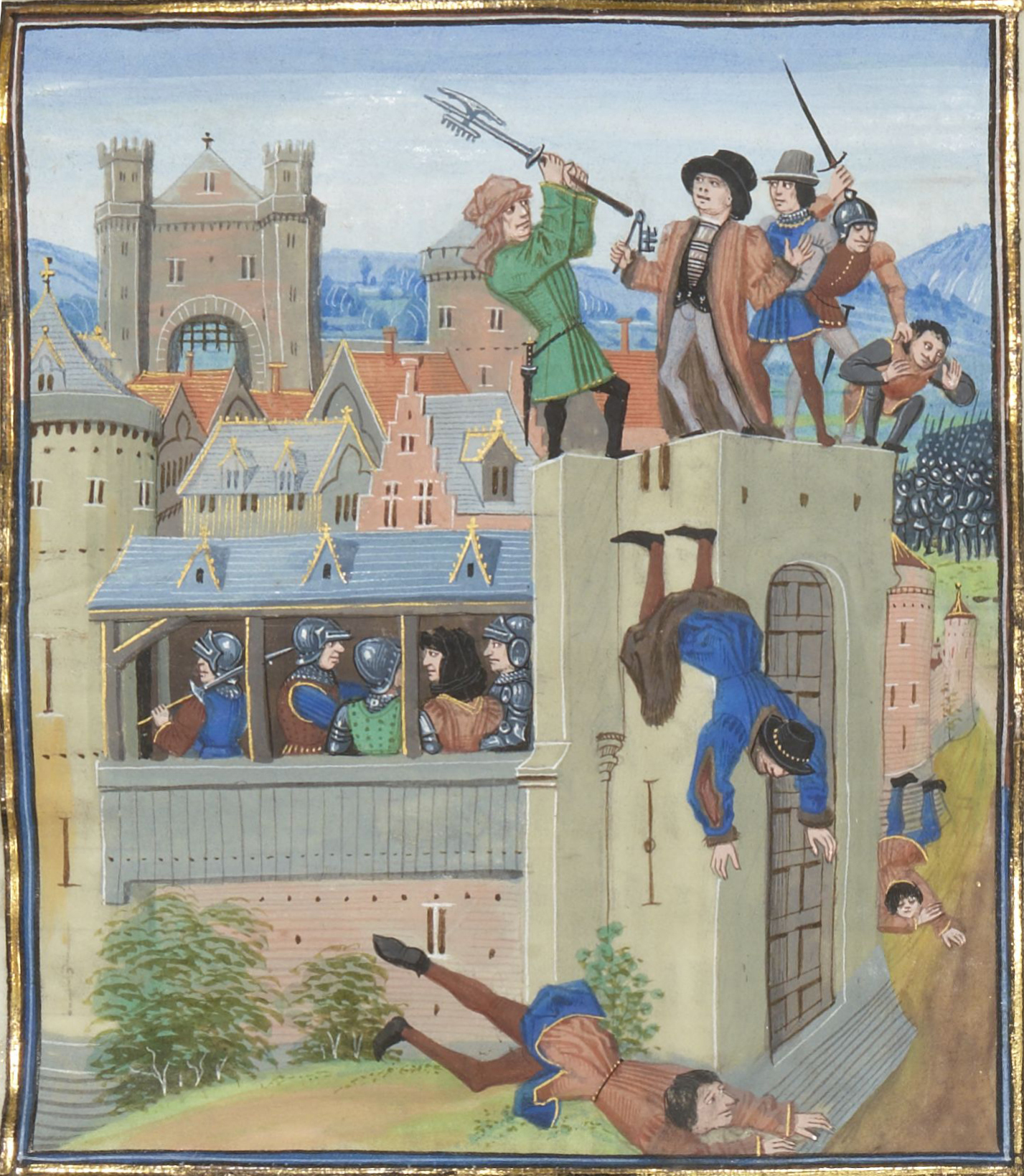 Assassinat d'Étienne Marcel en 1358. Jean Froissart, Chroniques, Flandre, Bruges, XVe s., folio 230, recto (BNF, ms. Français 2643).